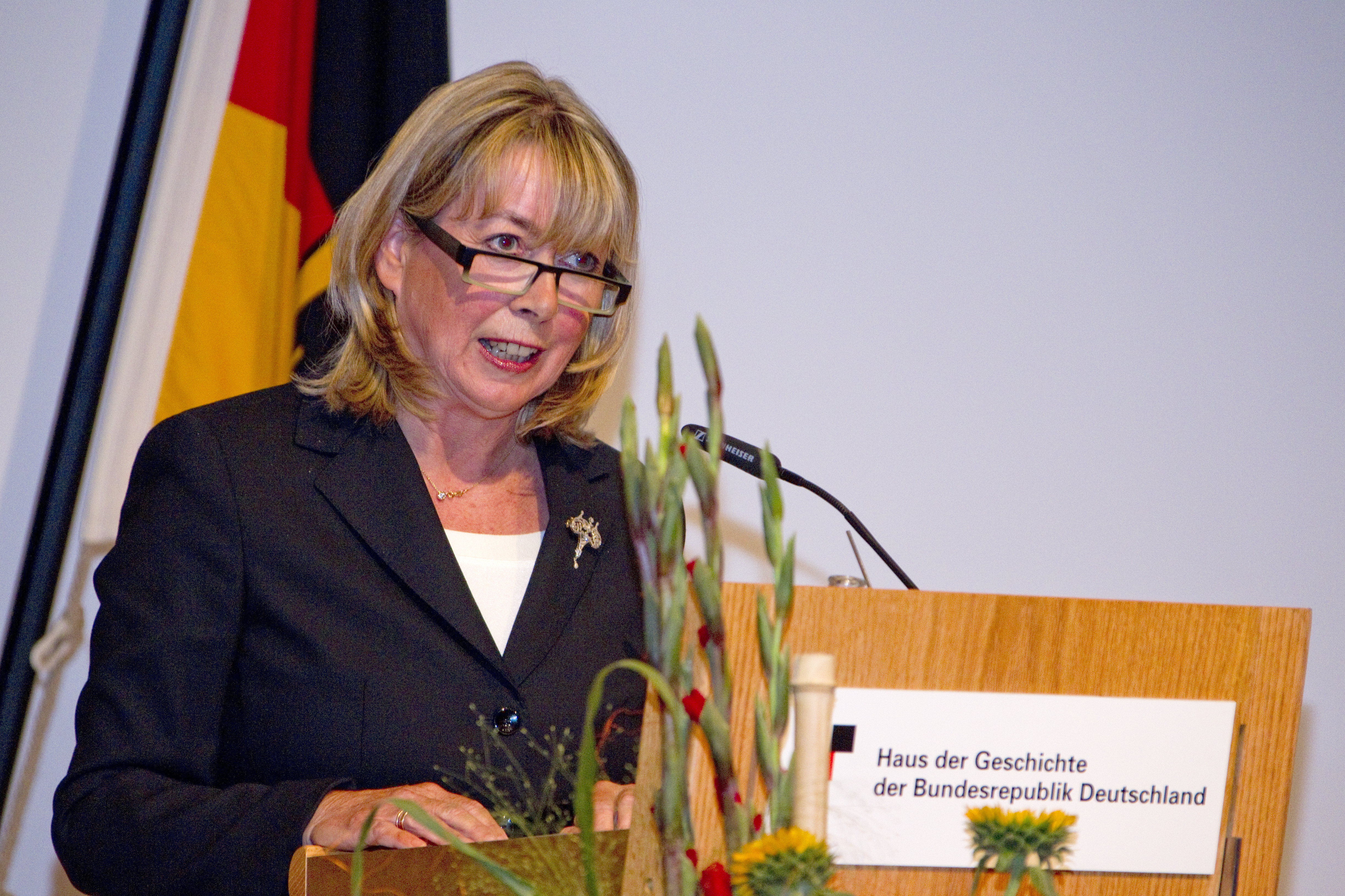 Begrüßung durch die Abteilungsleiterin Infrastruktur, Umweltschutz und Dienstleistungen im Bundesministerium der Verteidigung Ministerialdirektorin Alice Greyer-Wieninger.Am 30.Juli 2012 wurde in Bonn das Bundesamt für Infrastruktur, Umweltschutz und Dienstleistungen der Bundeswehr (BAIUDBw) in Dienst gestellt.Hierzu findet heute, am 6.September ein Festakt im Haus der Geschichte in Bonn statt. In diesem Rahmen werden neben dem Bundesminister der Verteidigung, Dr. Thomas de Maizière auch der Oberbürgermeister der Bundesstadt Bonn, Jürgen Nimptsch, die Abteilungsleiterin Infrastruktur, Umweltschutz und Dienstleistungen im Bundesministerium der Verteidigung Ministerialdirektorin Alice Greyer-Wieninger sowie der Präsident des BAUIDBw, Matthias Leckel, Worte an die Gäste richten.Das neue Bundesamt übernimmt zentrale Aufgaben für die Bundeswehr, die bislang.u.a. im Verteidigungsministerium, im bisherigen Bundesamt für Wehrverwaltung und den aufzulösenden Wehrbereichsverwaltungen und Infrastrukturstäben wahrgenommen wurden..Die Bündelung fachlicher und organisatorischer Kompetenz sowie die zentrale Aufgabenwahrnehmung in überwiegend gemischt zivil-militärischen Strukturen führen zu einem Wegfall von Schnittstellen, zur Stärkung der Effektivität und der Effizienz und zu einer Verschlankung und Beschleunigung der Prozesse.© Bundeswehr / Mandt